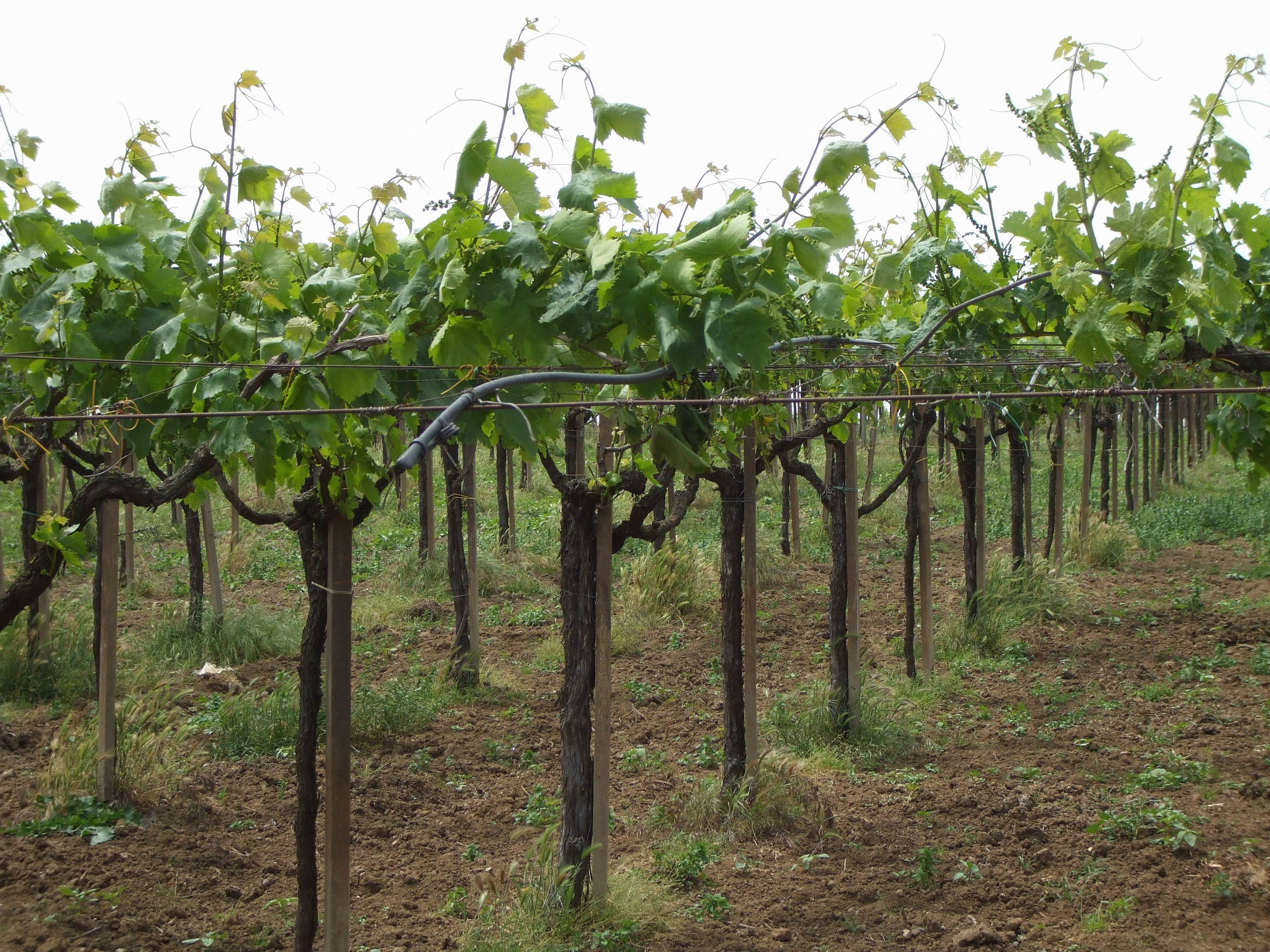 Cecchina - I vigneti, particolare